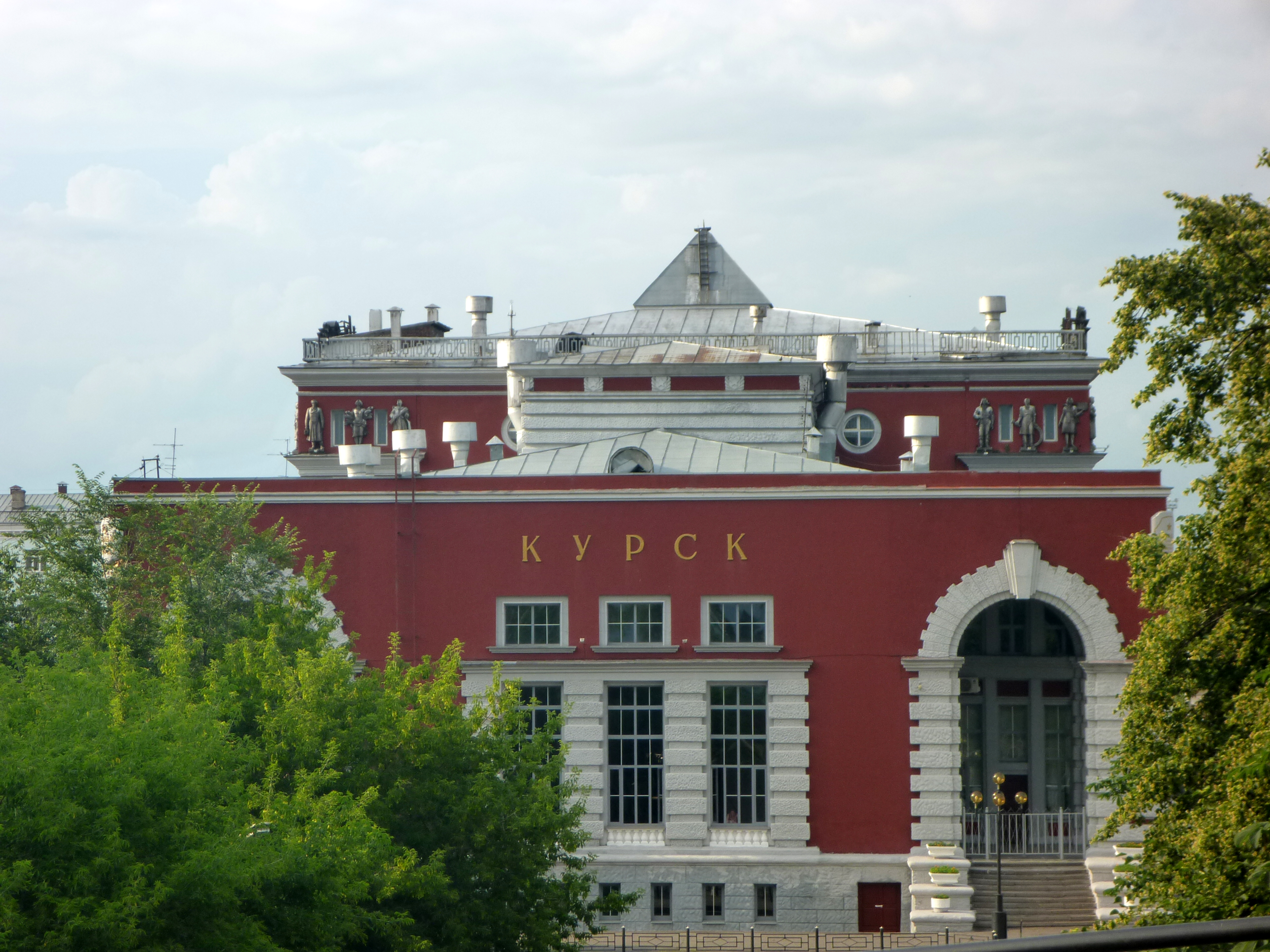 Здание вокзала железнодорожной станции Курск: площадь Привокзальная, Курск, Курская область